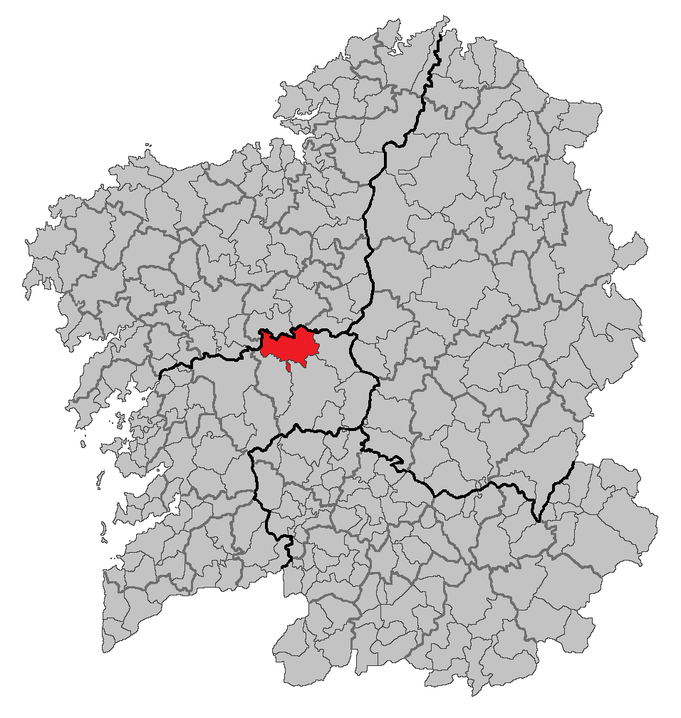 Mapa coa localización do concello de Vila de Cruces.